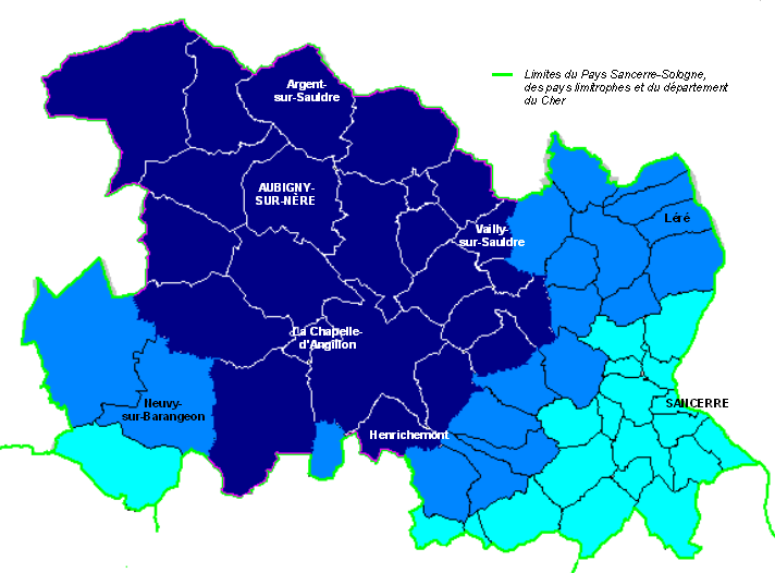 Carte de la zone géographique du Cher-Nord.